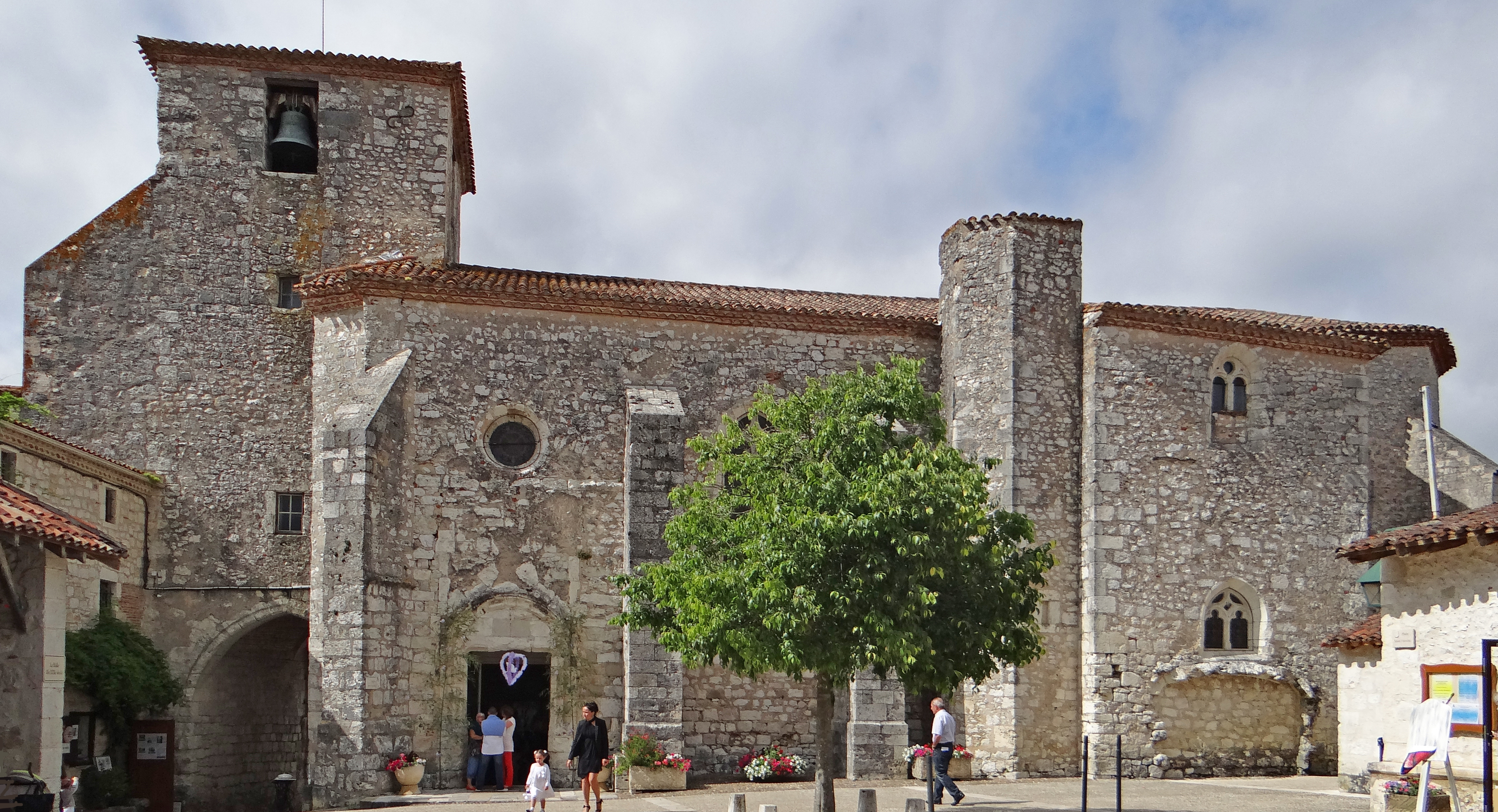 Pujols - Église Saint-Nicolas - Portail, porte nord et clocher depuis la place Saint-Nicolas